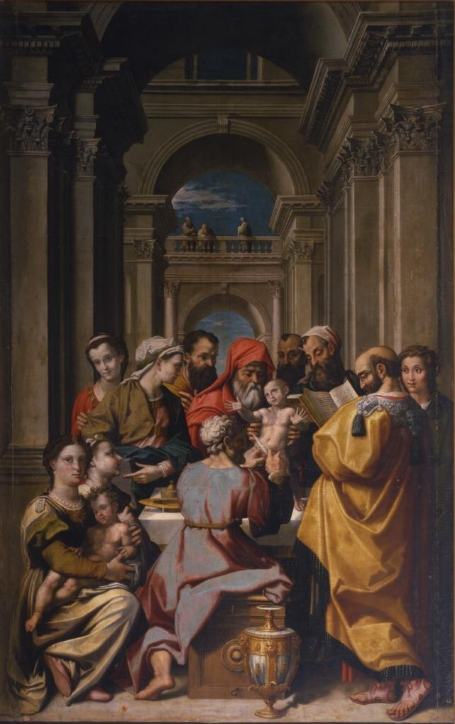 La obra representa el momento en que el Niño Jesús, según lo prescrito en la ley judía, fue circuncidado.